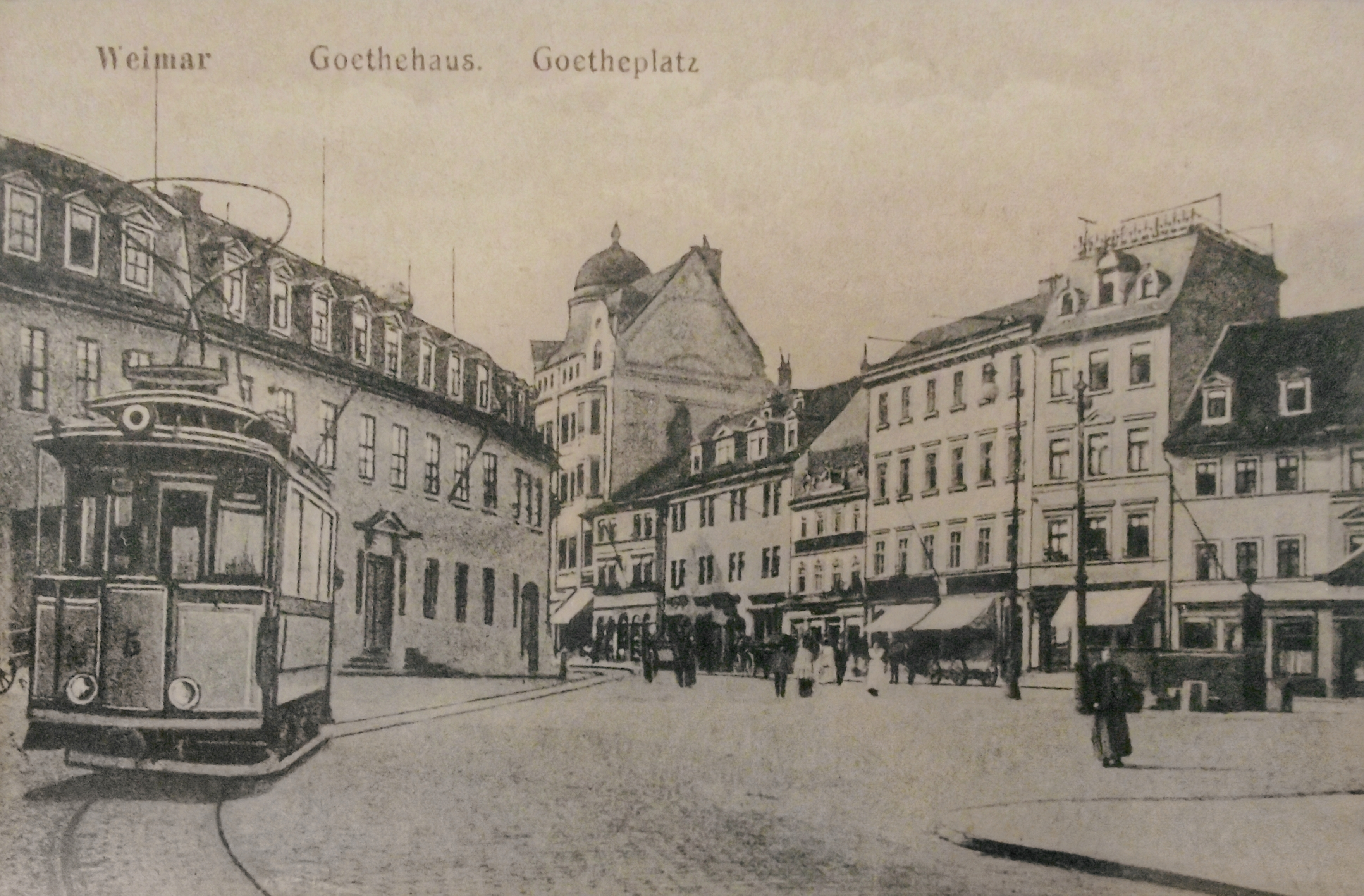 1921 - Weimar